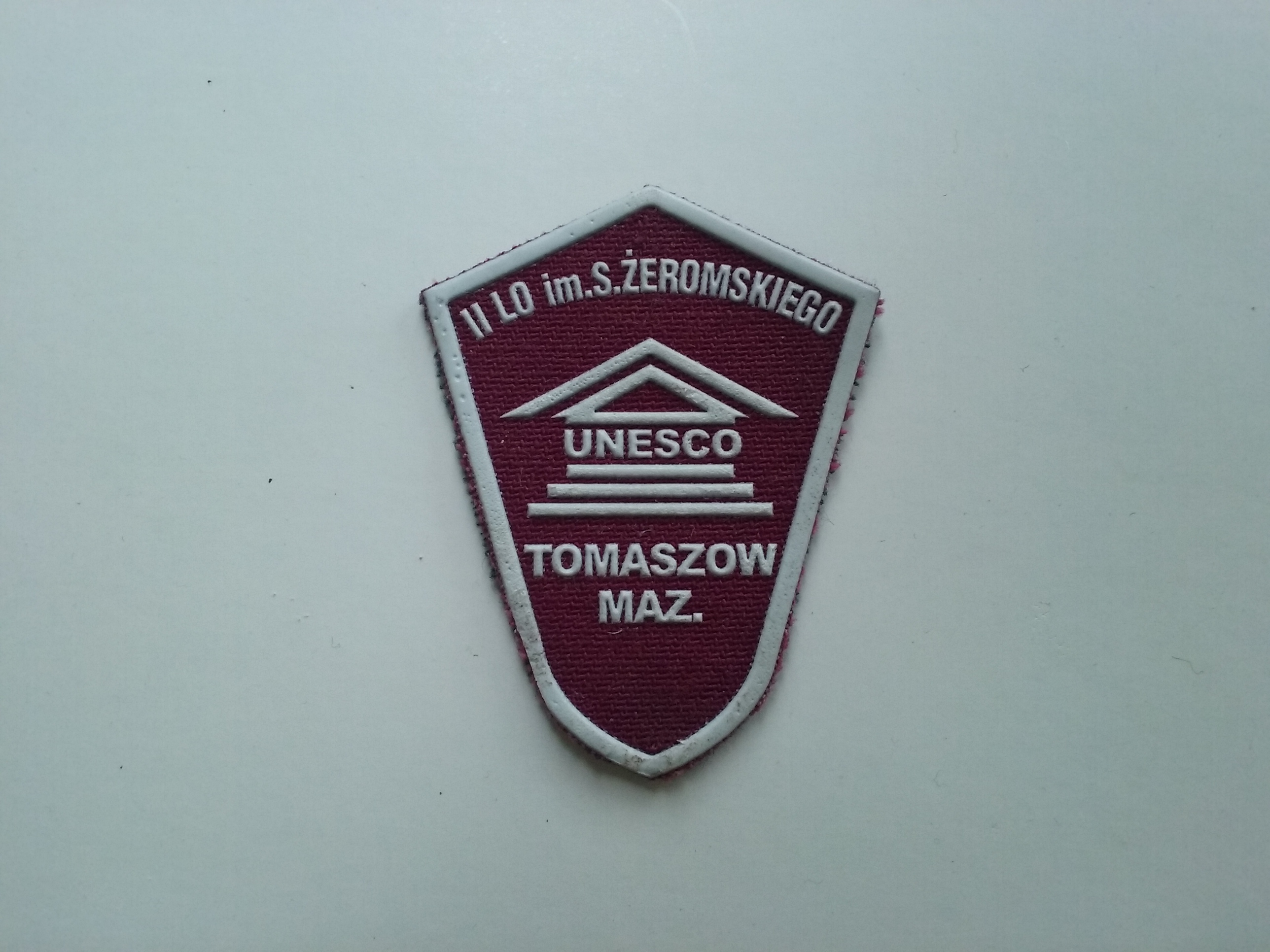 II LO Tomaszów Mazowiecki, tarcza uczniowska